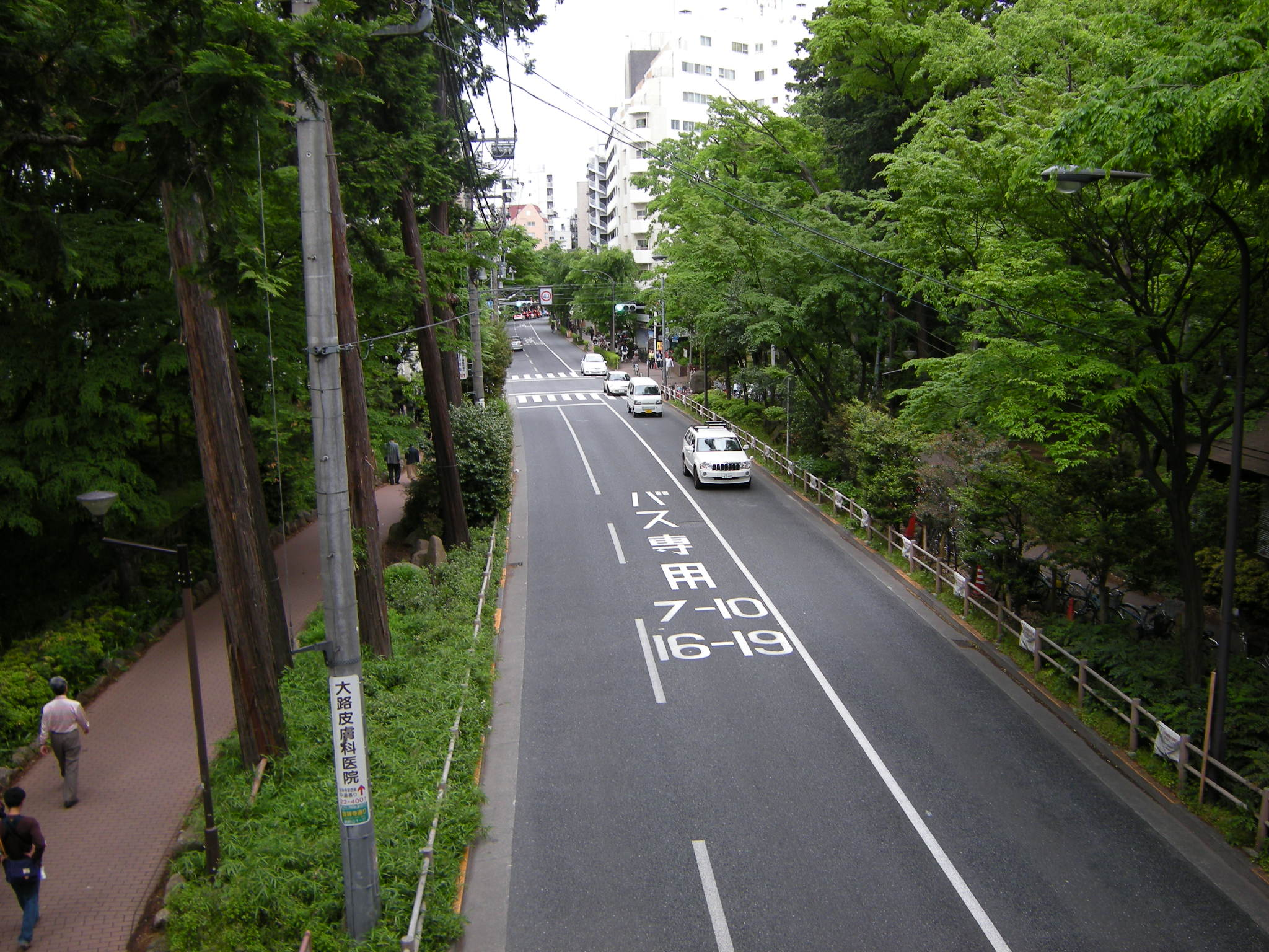 陸橋の上 吉祥寺駅方向を望む 井の頭恩賜公園を縦断する東京都道114号武蔵野狛江線 吉祥寺通り（公園通り）